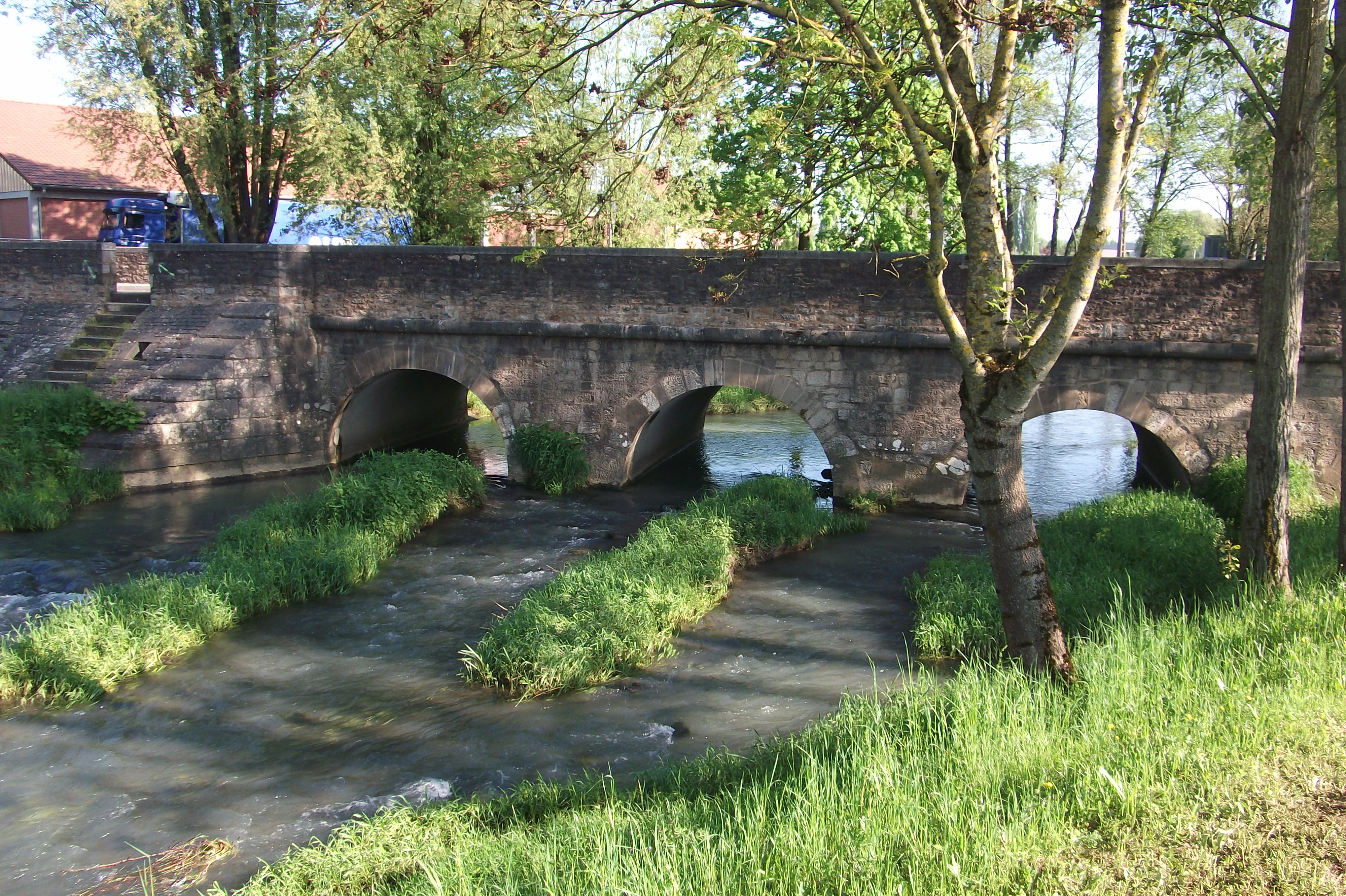 Le pont de Pontarcher de Vesoul (Haute-Saône, Franche-Comté)